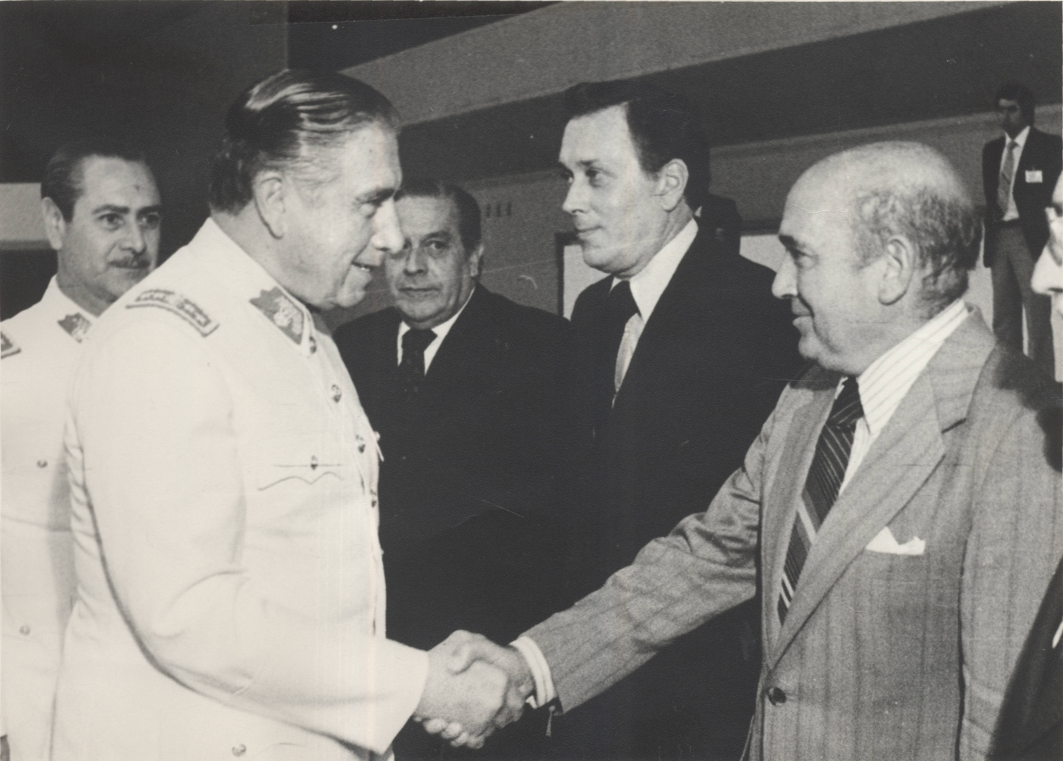 Sergio Diez estrecha la mano de Augusto Pinochet Ugarte.